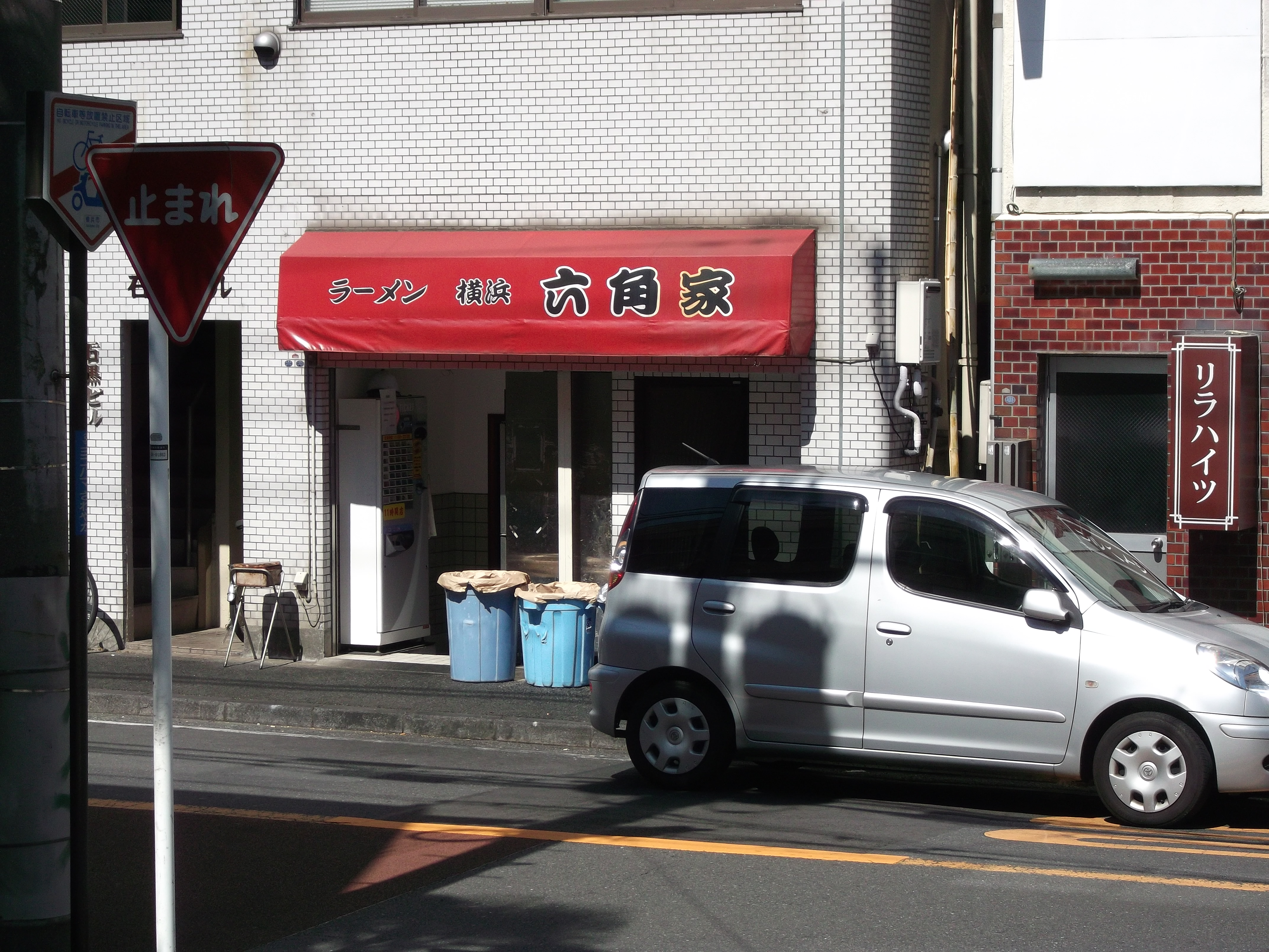 六角家本店